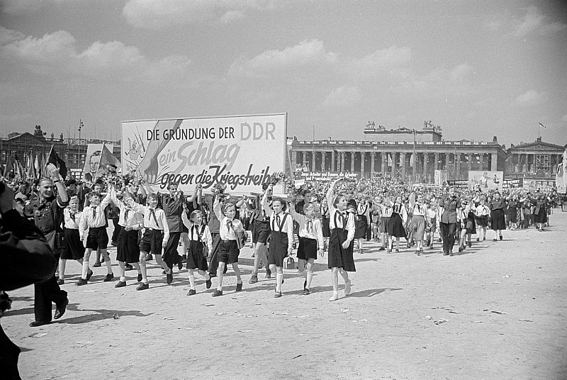 Original image description from the Deutsche Fotothek Mitglieder der FDJ und der Pionierorganisation während einer Friedensdemonstration auf dem Marx-Engels-Platz (heute: Schlossplatz)